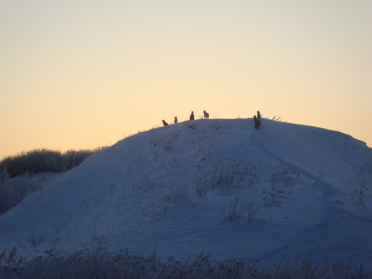 Татарча/tatarça: Карама тавы